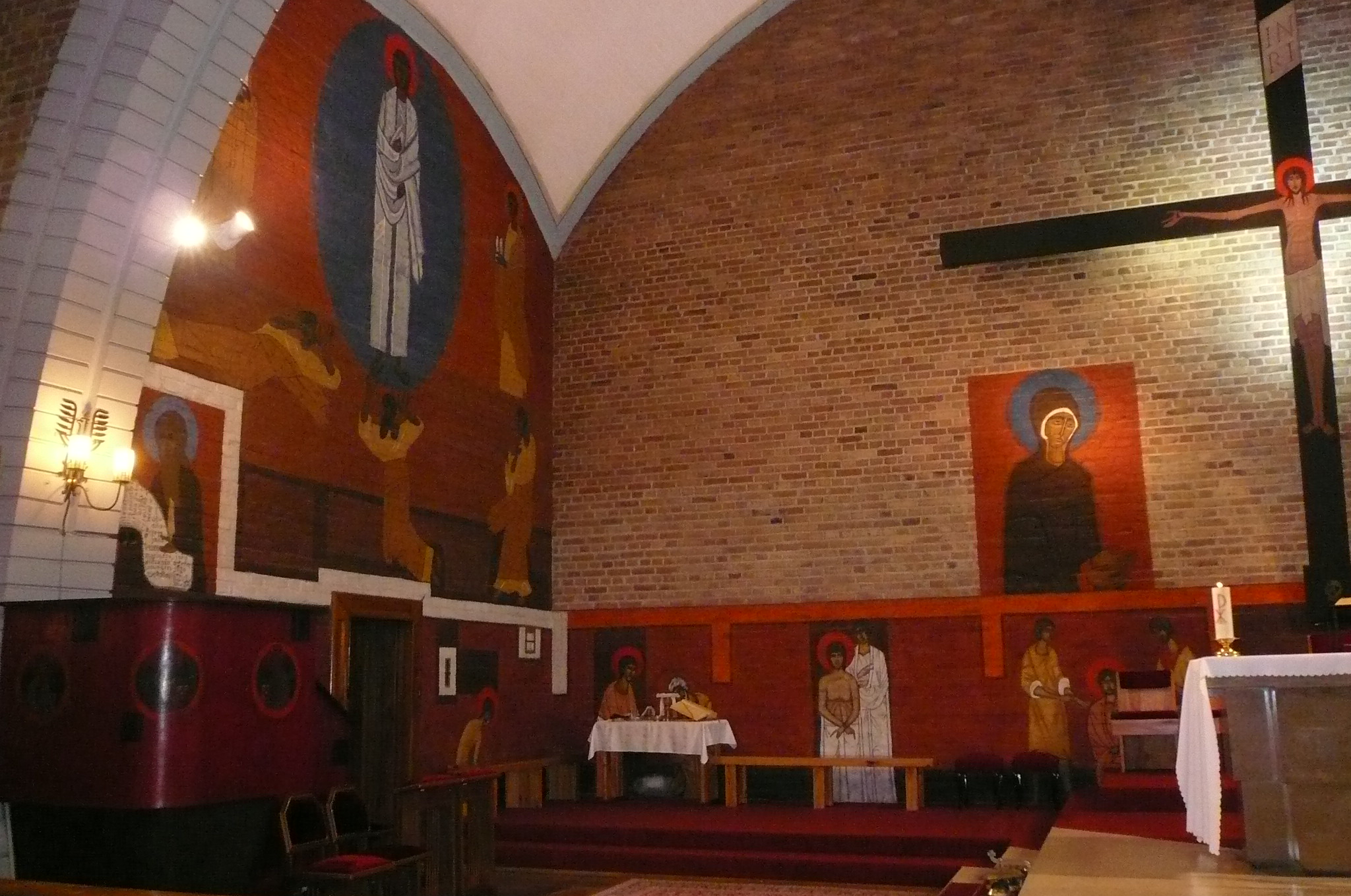 Malowidła Jerzego Nowosielskiego w prezbiterium kościoła Podwyższenia Krzyża Świętego na Jelonkach Południowych